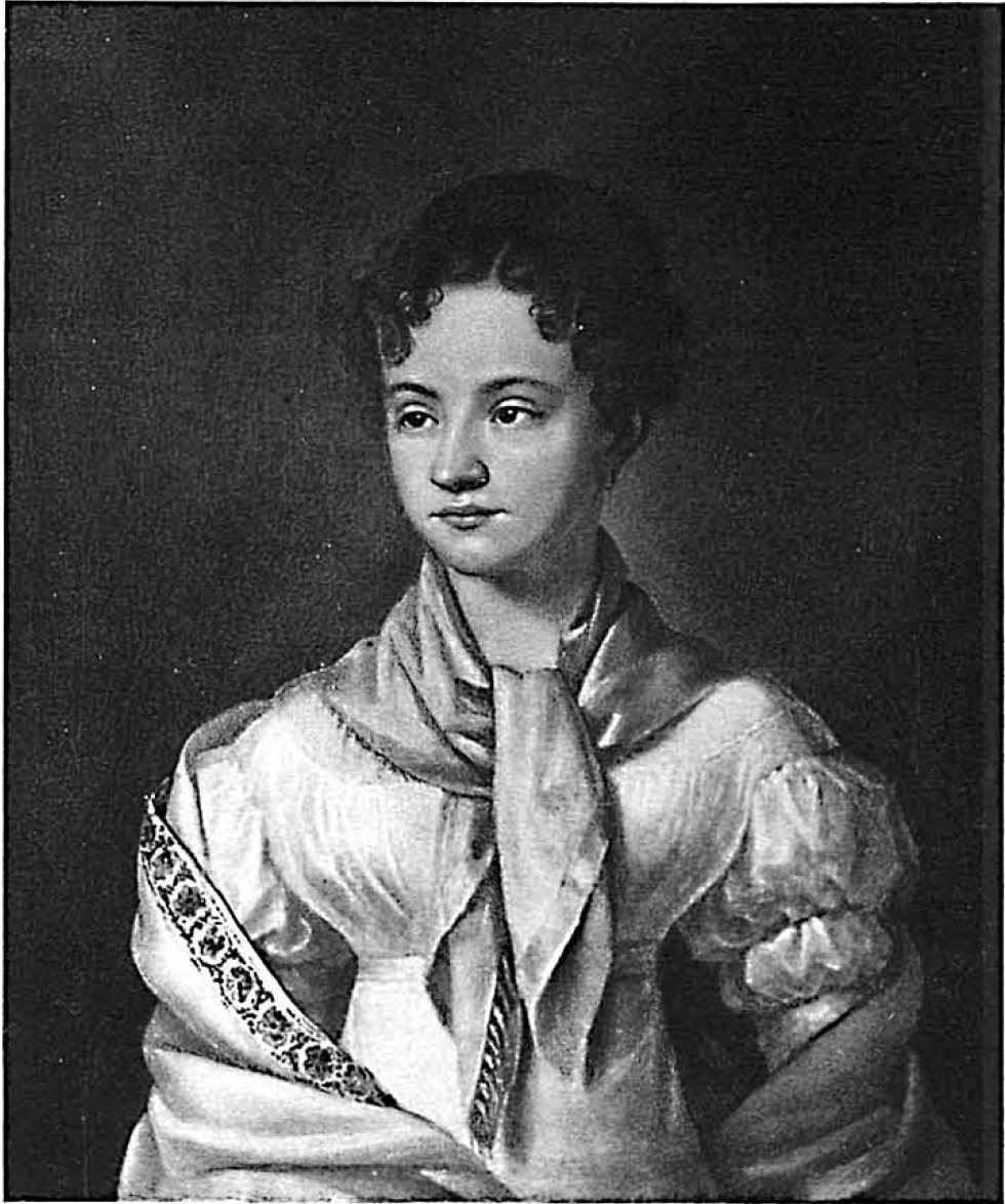 Софья Николаевна Раевская (1806-1883)